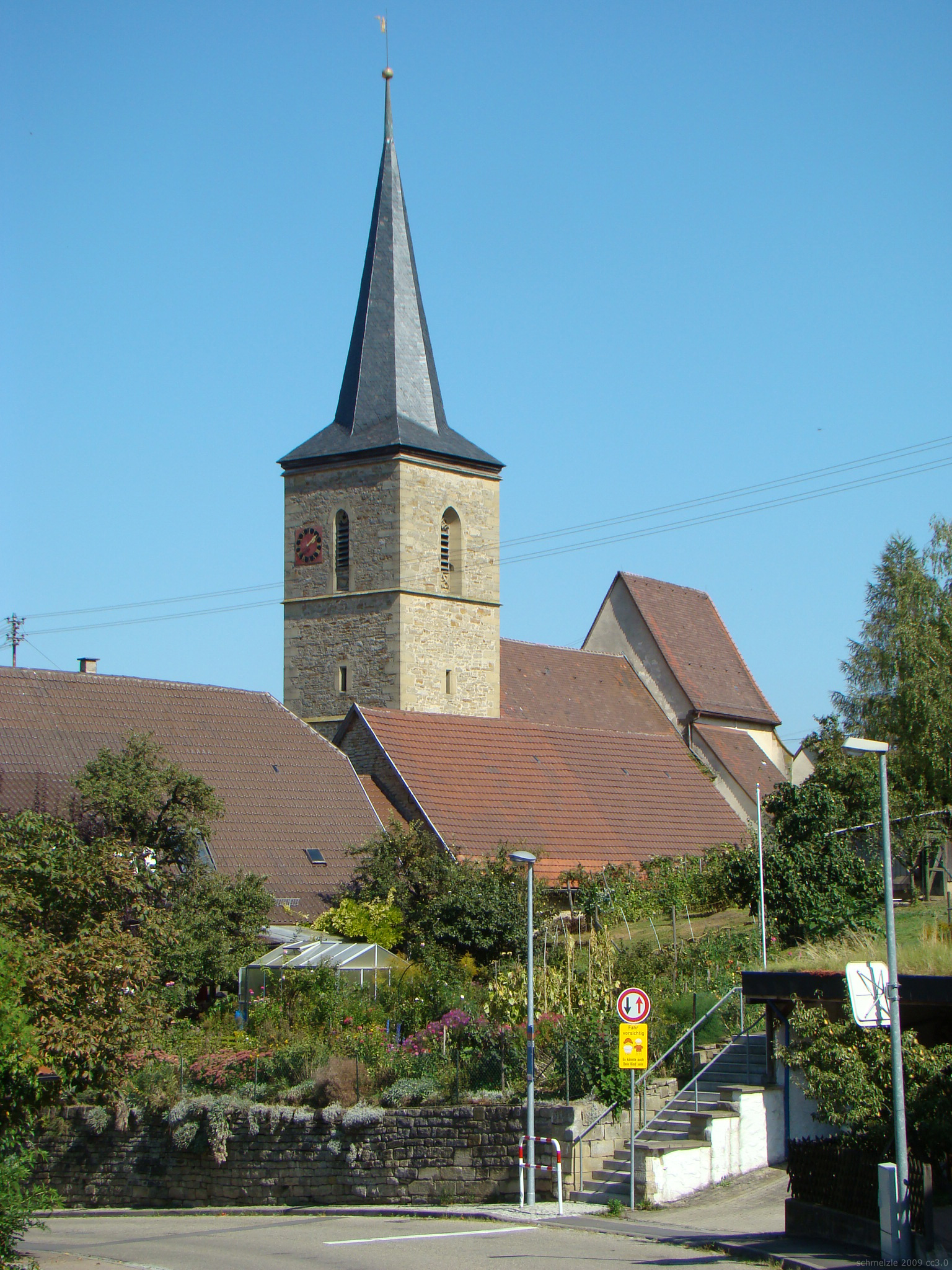 Kirche in Besigheim-Ottmarsheim